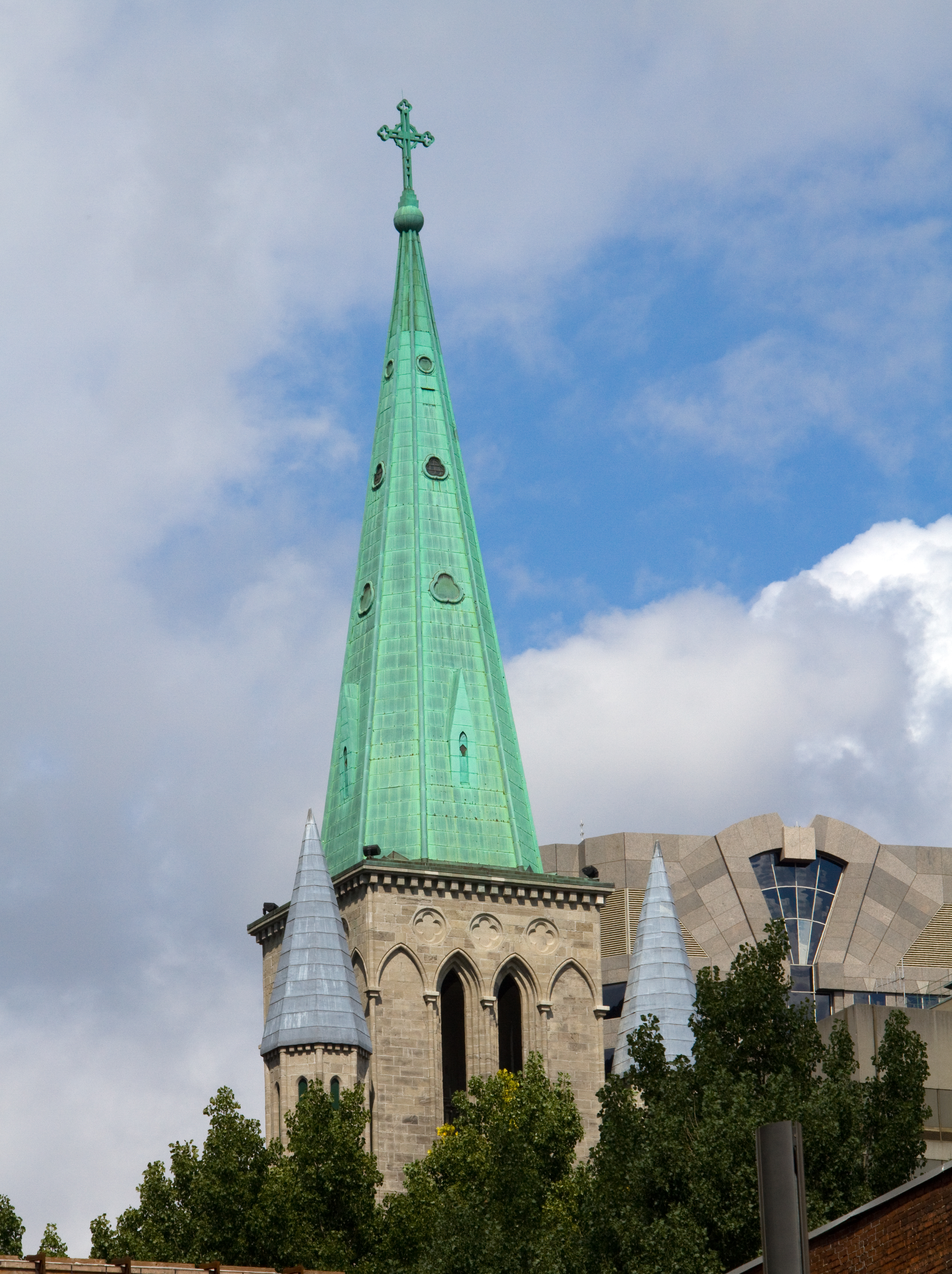 Montreal Spire